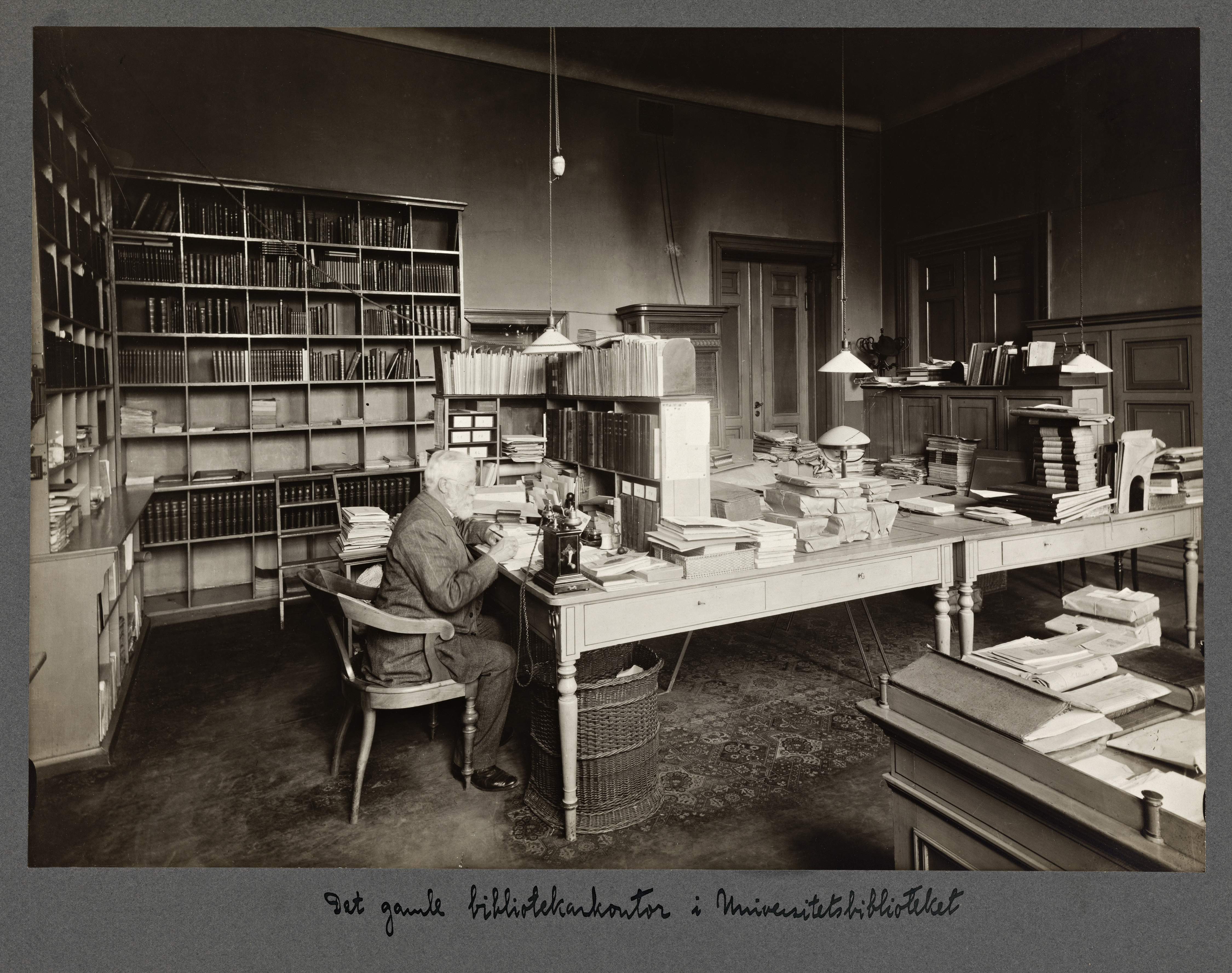 Beskrivelse / Description: Axel Drolsum (1846-1927) var sjef for Universitetsbiblioteket i Oslo 1876–1922. I årene 1851–1913 holdt Universitetsbiblioteket til i den ene av universitetsbygningene ved Karl Johans gate (Domus Bibliotheca). Dato / Date: før 1913 Sted / Place: Oslo, Karl Johans gate 47 Fotograf / Photographer: ukjent / unknown Digital kopi av original / Digital copy of original: s/h papirpostitiv Eier / Owner Institution: Nasjonalbiblioteket / National Library of Norway Lenke / Link: Bildesignatur / Image Number: blds_06037